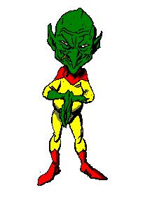 Un marciano clásico genérico.